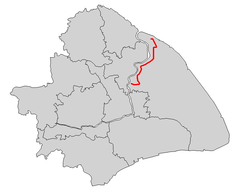 上海轨道交通6号线简图 本地图的底图不表示上海市全部所辖区域 因版面关系，上海市所辖之崇明岛、长兴岛等与本线路无关的离岛未在本图中表示。